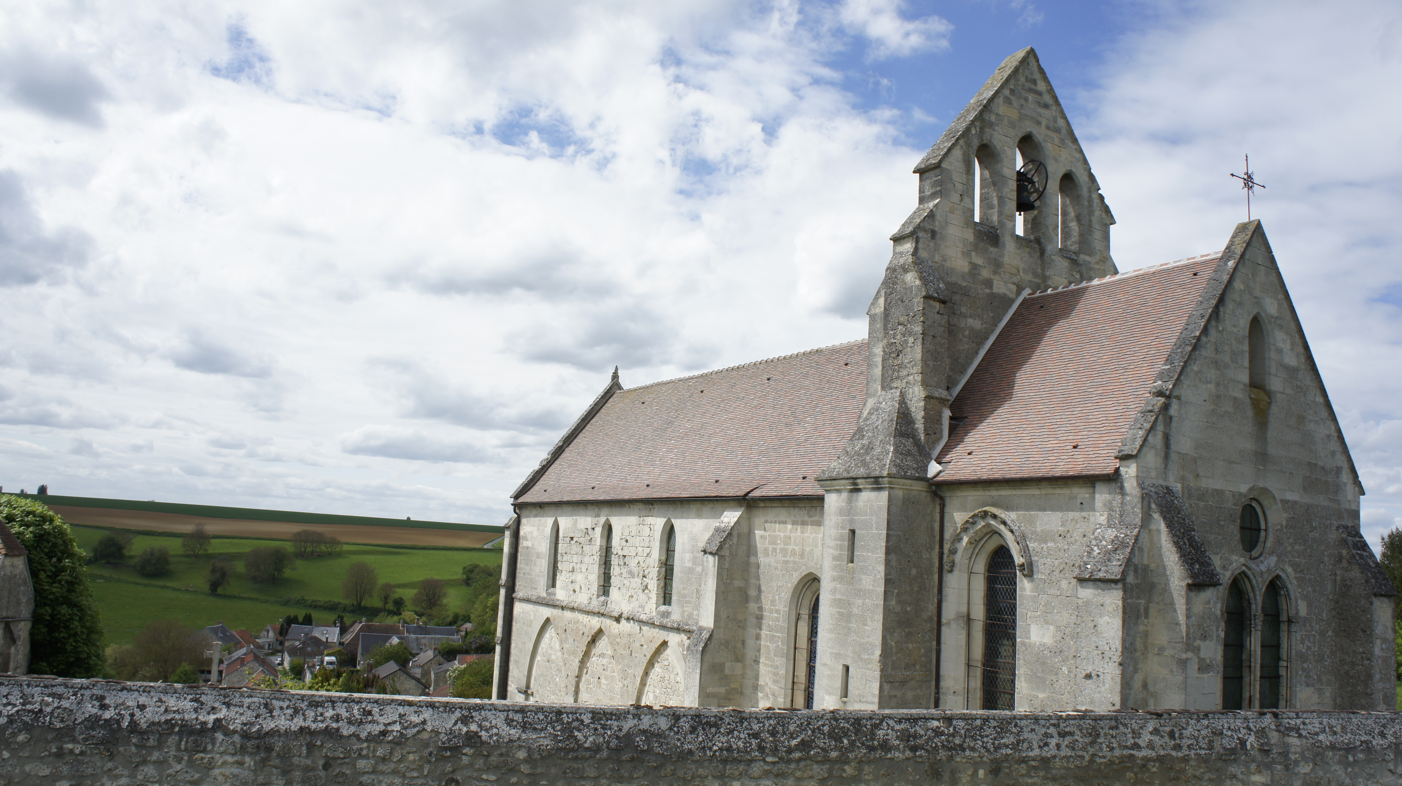 Le côté sud l' église et son cimetière.